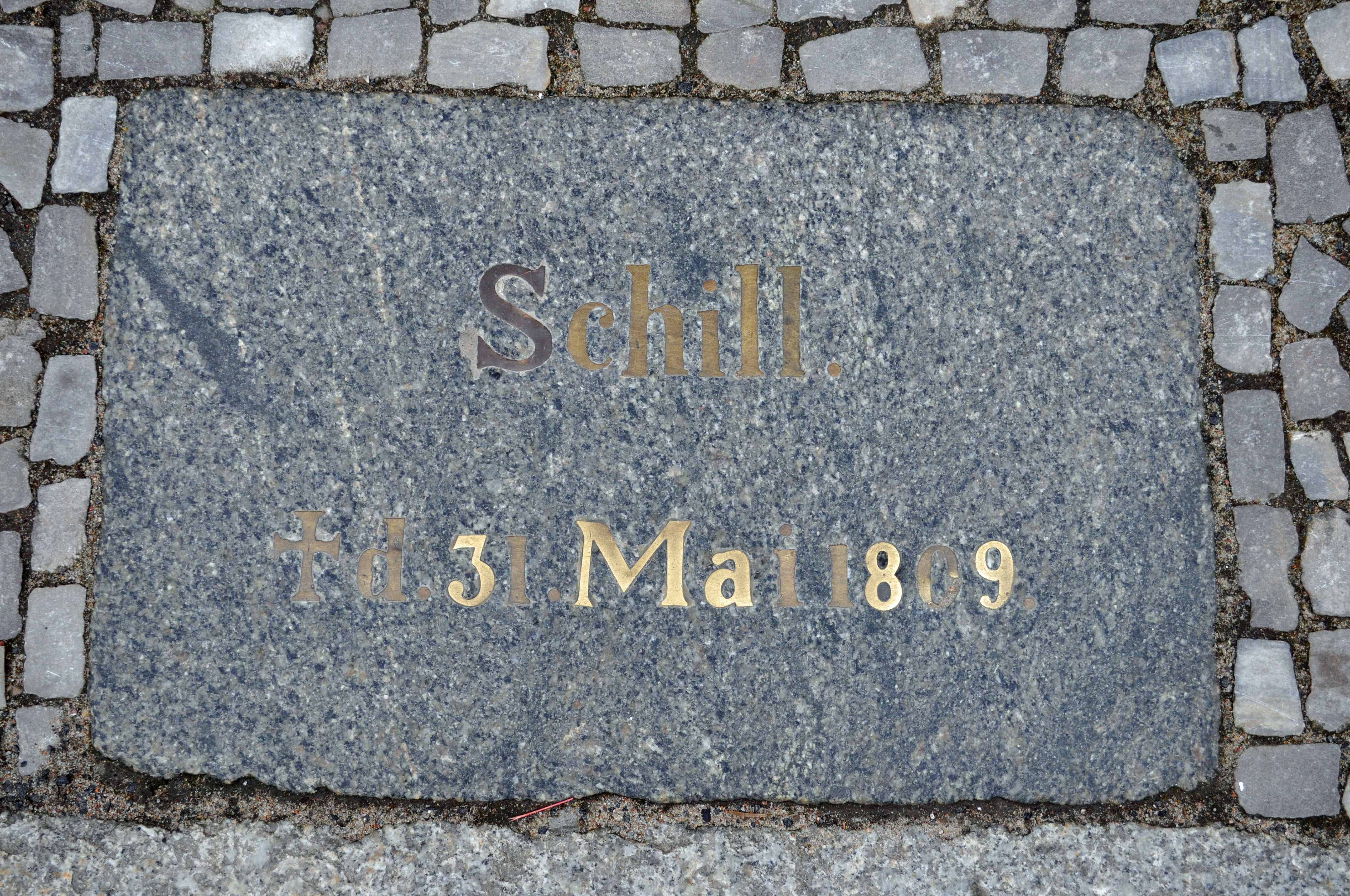 Gebäude bzw. Gebäudedetail in Stralsund. Straße und Hausnummer siehe Dateiname.